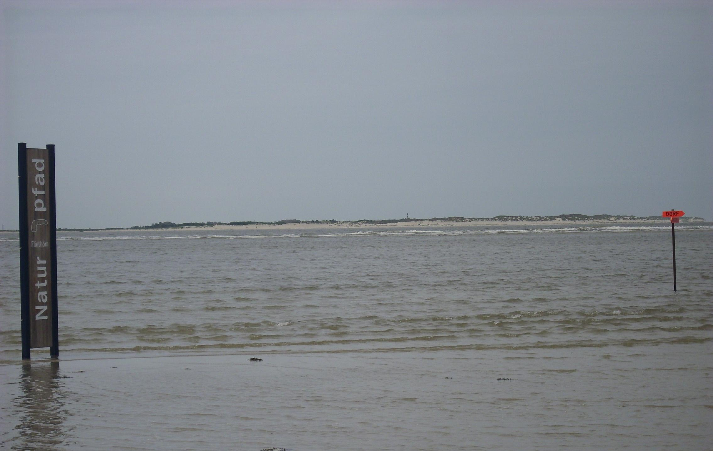 Baltrum vom Strand auf Langeoog aus gesehen